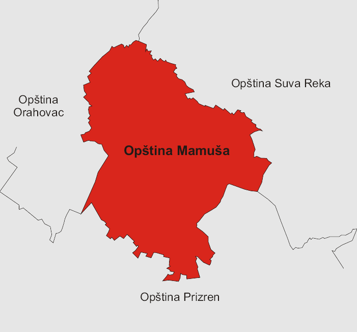 аутор Варјачић Владимир